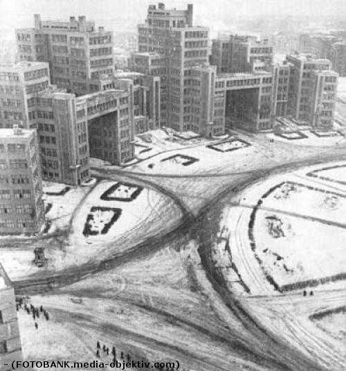 Будинок Держпрому у Харкові.